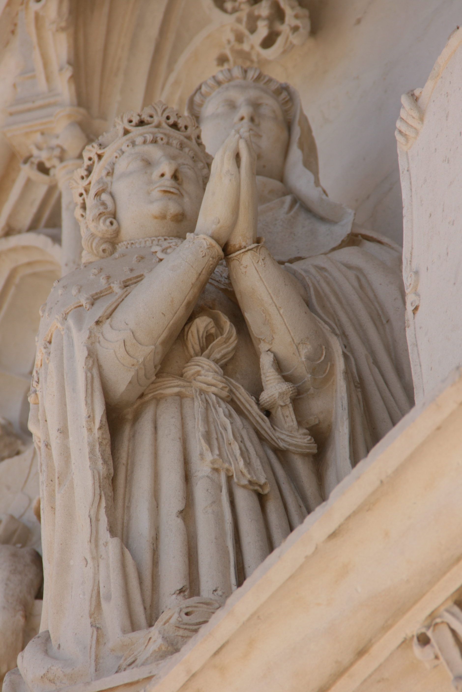 Tympan du Monastère Royal de Brou, à Bourg-en Bresse : Philibert II de Savoye